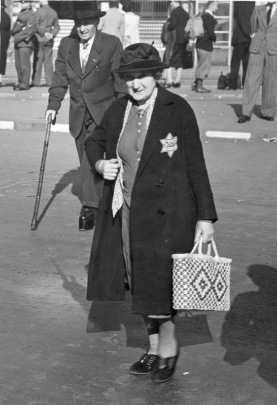 ADN-Zentralbild/ Archiv 27.9.1941 Die "Endlösung der Judenfrage" durch die deutschen Faschisten. Alle Juden werden zum Tragen des Judensterns gezwungen. [Scherl Bilderdienst]